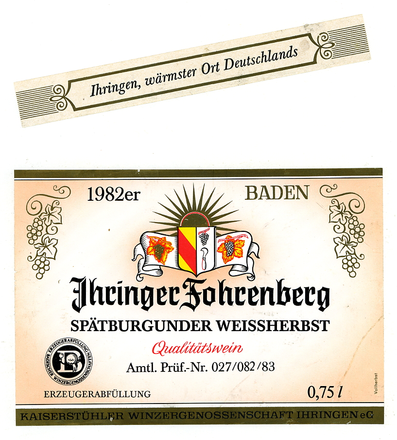 Etiquette de pinot noir de Baden, millésime 1982, avec la mention Ihringen, le lieu le plus chaud d'Allemagne.